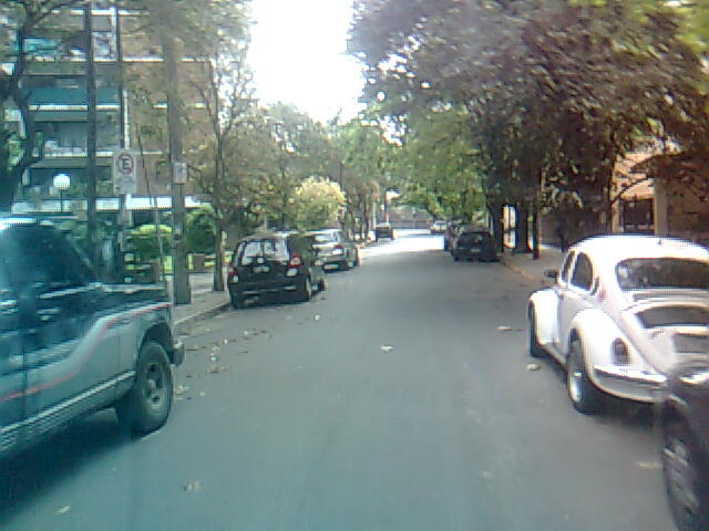 Calle Gral. Urquiza en Acassuso, Partido de San Isidro, Zona Norte del Gran Buenos Aires, Argentina.